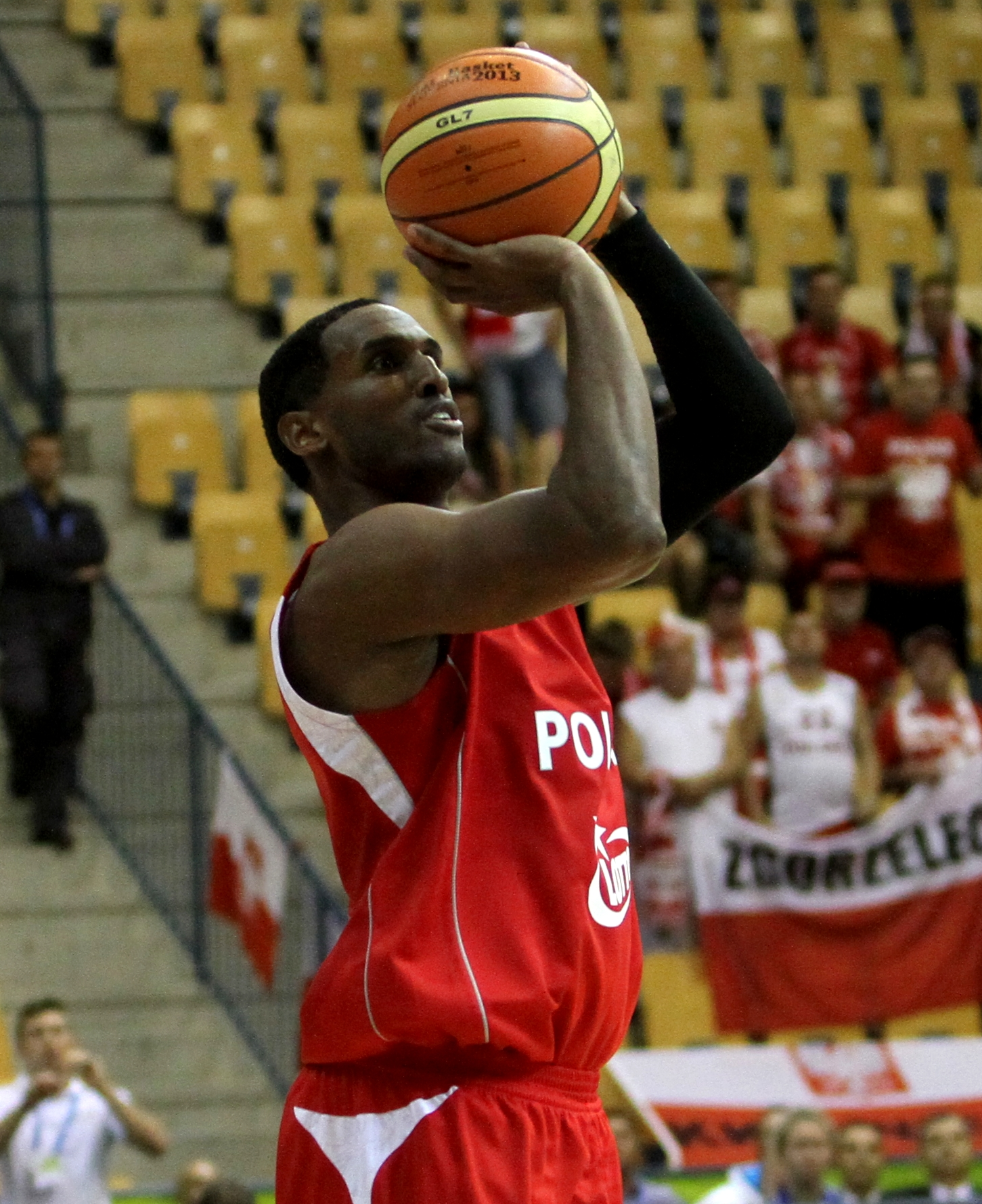 Reprezentacja Polski koszykarzy z 2013 roku. Thomas Kelati